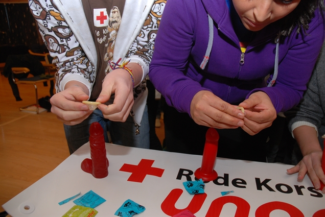 Røde Kors Ungdoms arbeid med seksuell helse